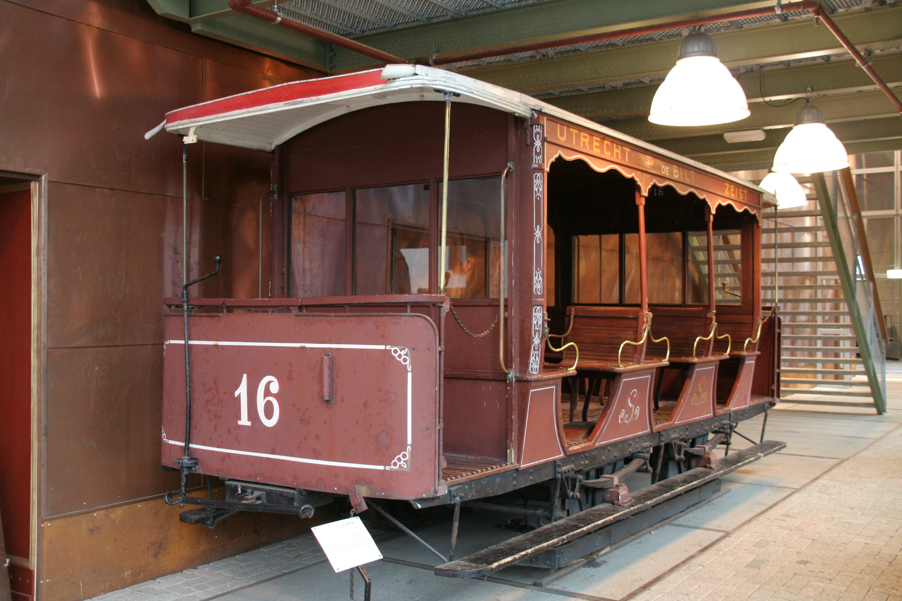 Het destijds nog onverbouwde rijtuig 16 van de STM.